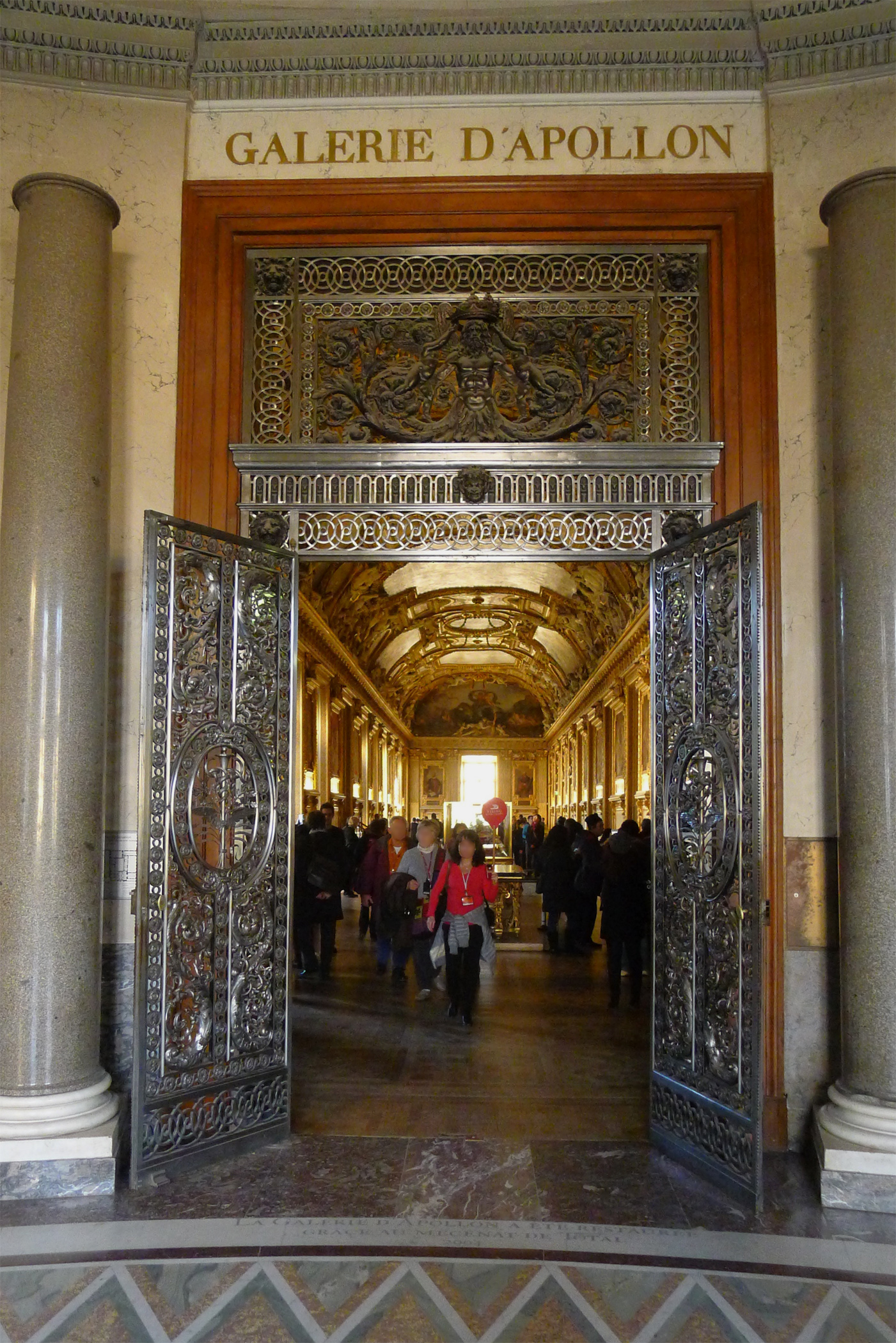 La galerie d'Apollon du Louvre - Paris